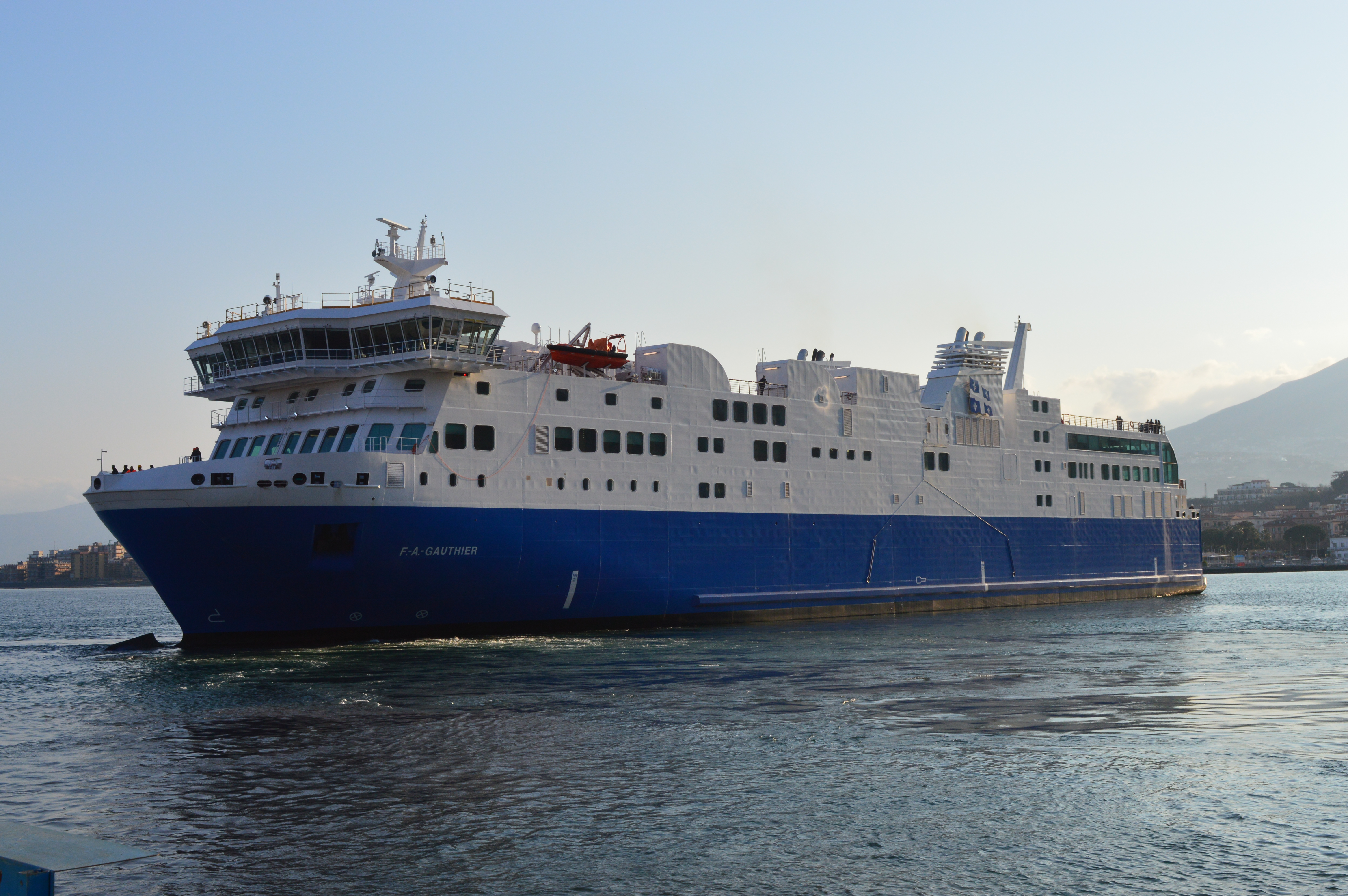 F.-A. Gauthier en essais à Castellamarre di Stabia